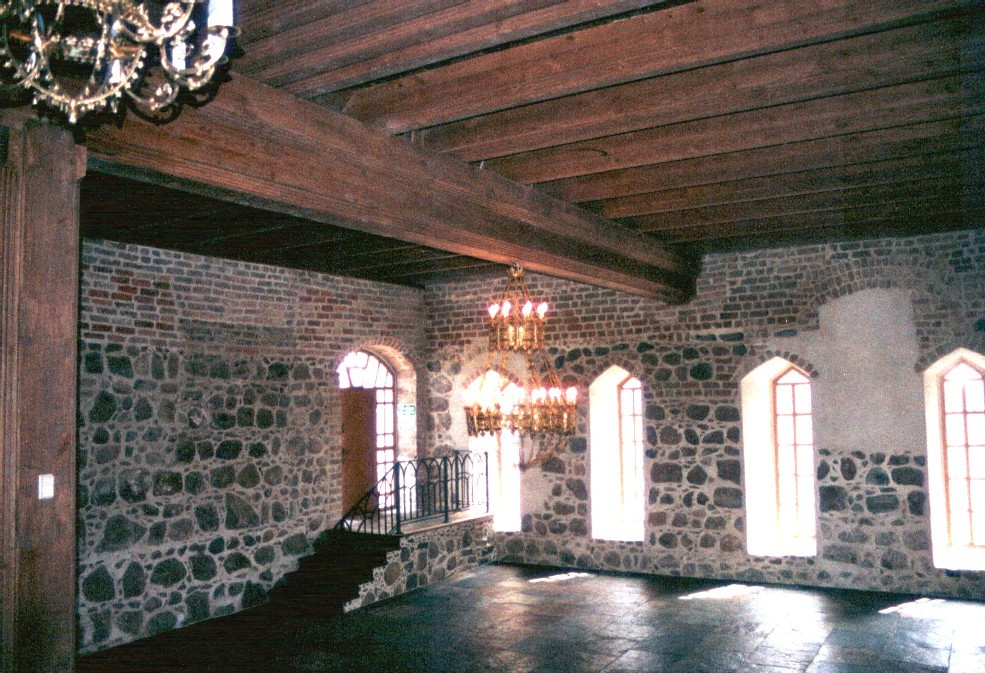 Kloster Zehden - Churfürstenhaus (ehemaliger Westflügel) - restaurierter Speisesaal